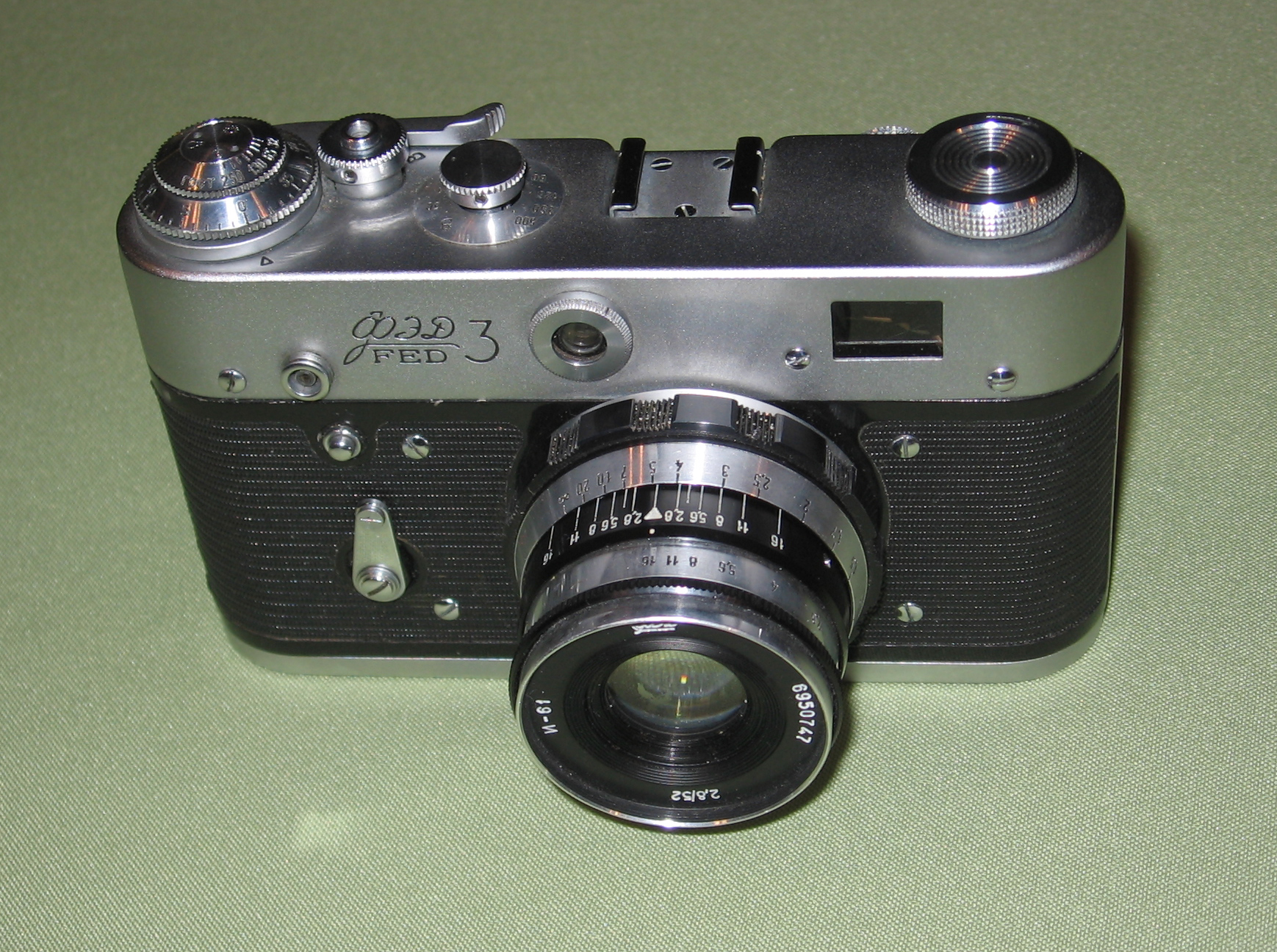 FED 3 camera